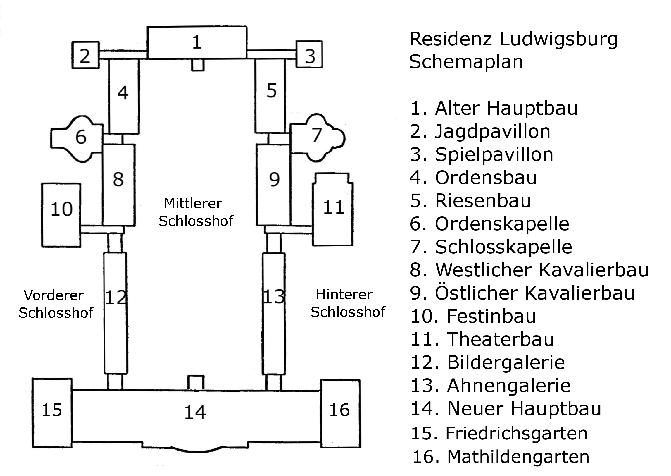 Residenz Ludwigsburg, Schemaplan.